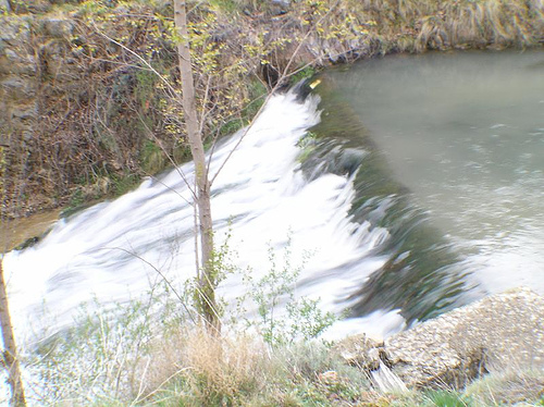 Turia River. Albarracín, Teruel, Aragon, Spain